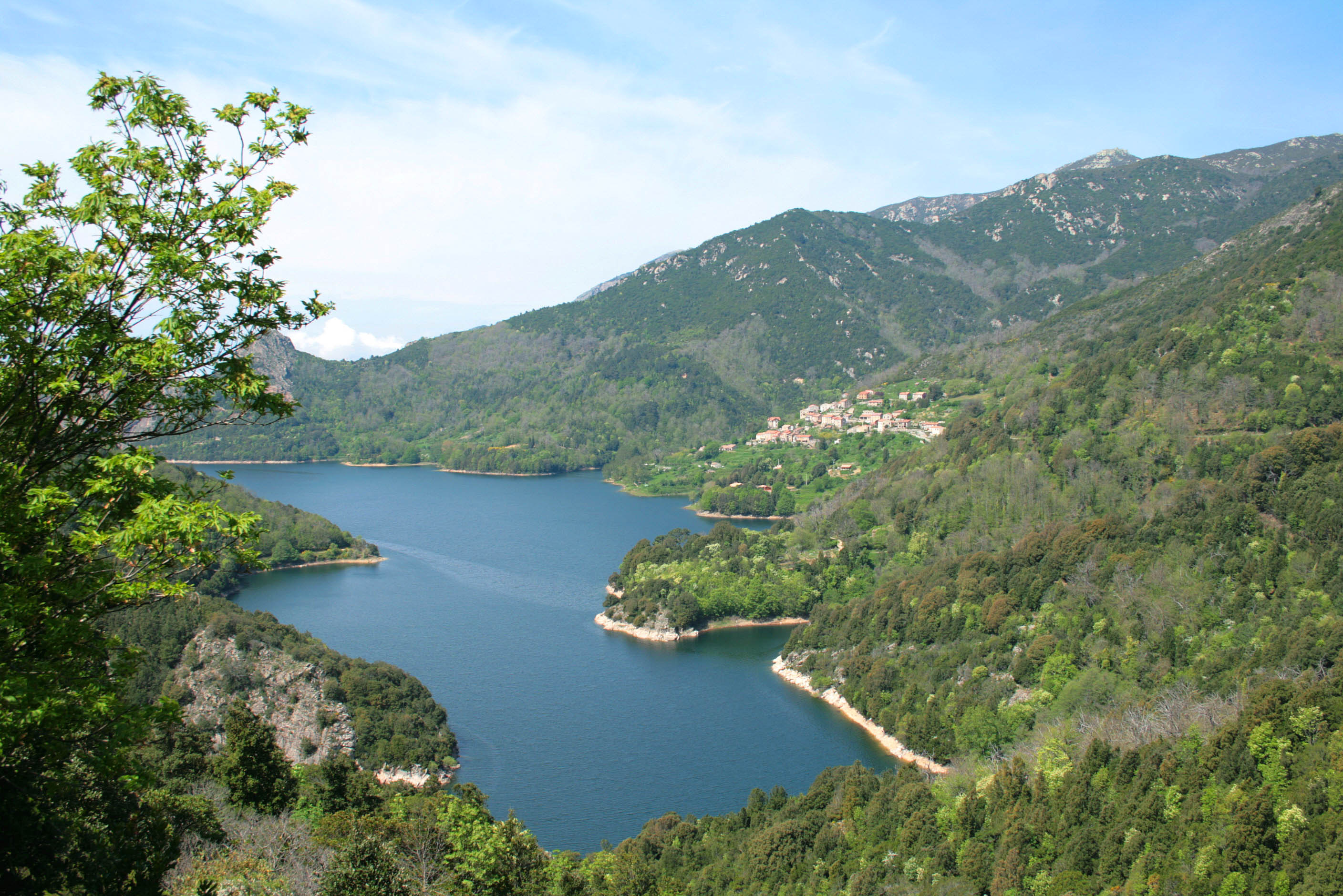 Tolla France (Corse du Sud), le village et son lac de barrage.